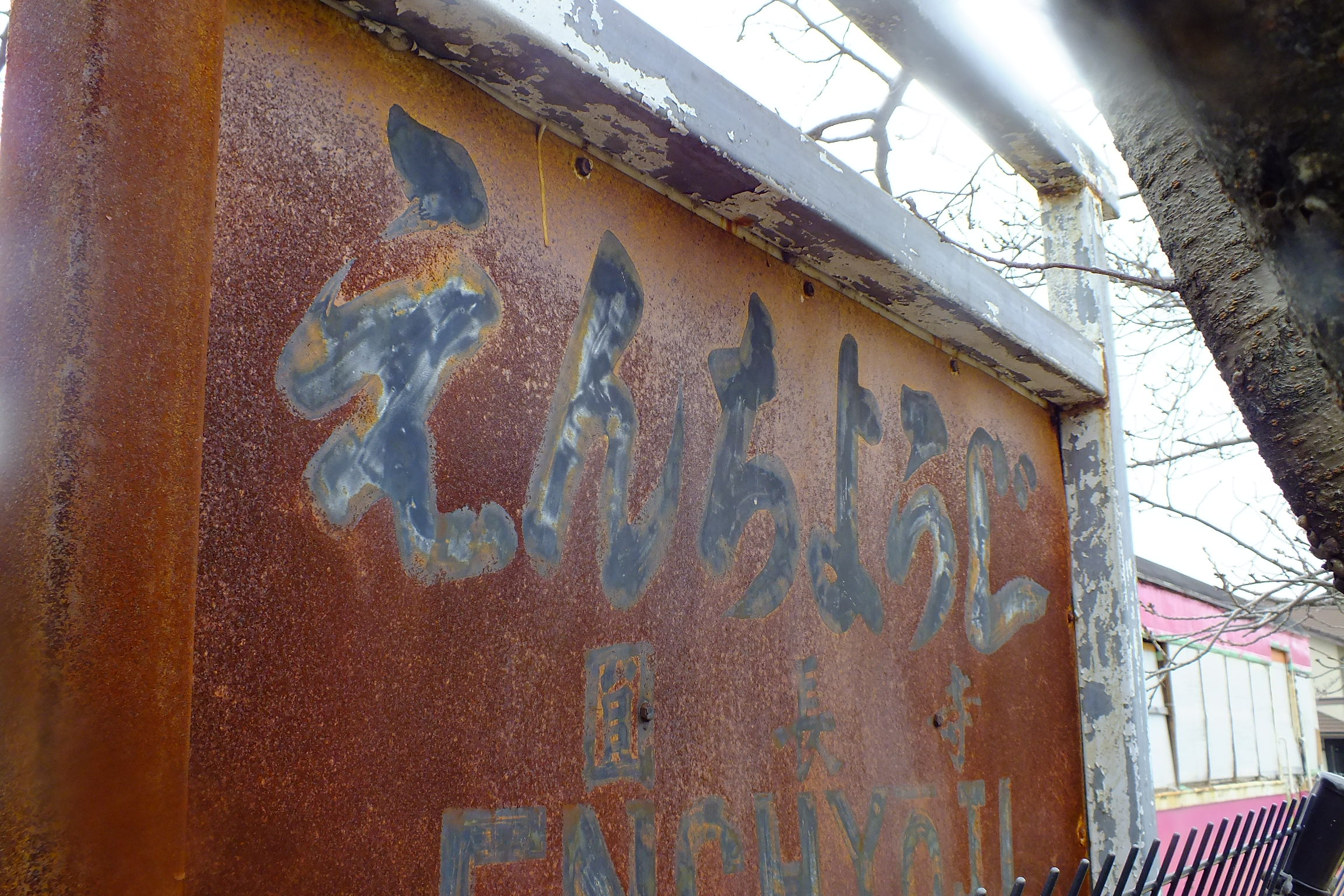 別府鉄道 キハ2気動車 野口線で使用。1931年製造、1965年入線。小型の車両で、円長寺広場に保存。